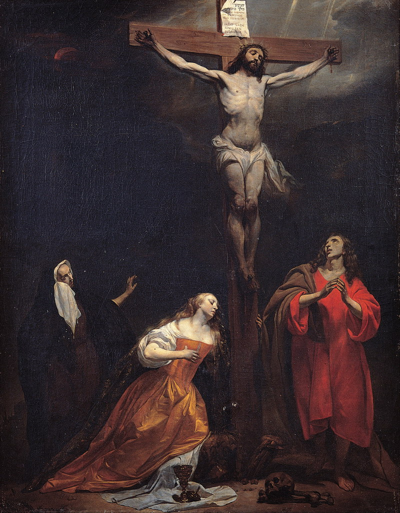 Г Метсю Голгофа бл 1665: релігійна композиція